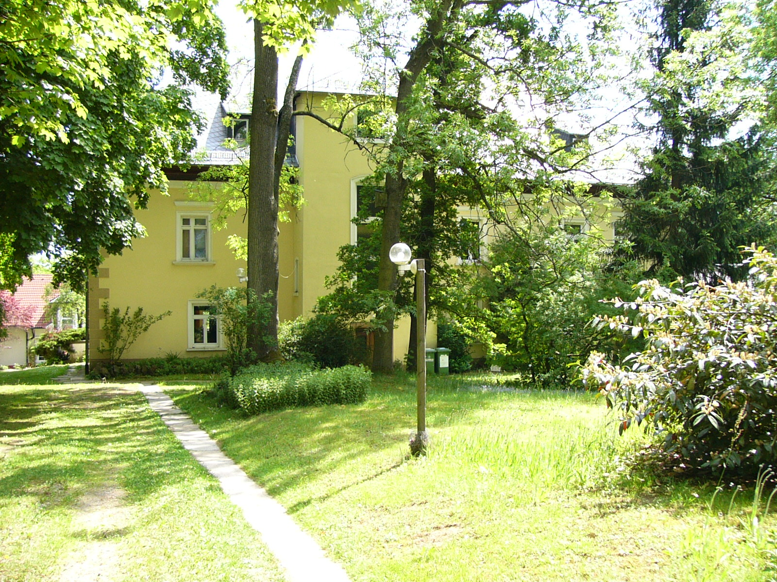 Heutige Ansicht des ehemaligen Rittergutes Sachs